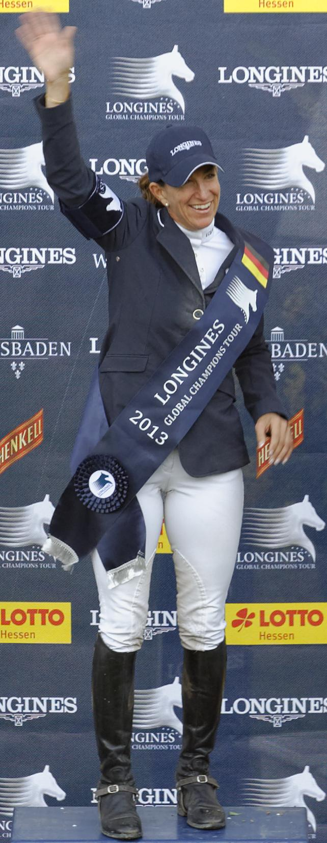 Internationales Pfingstturnier Wiesbaden 2013